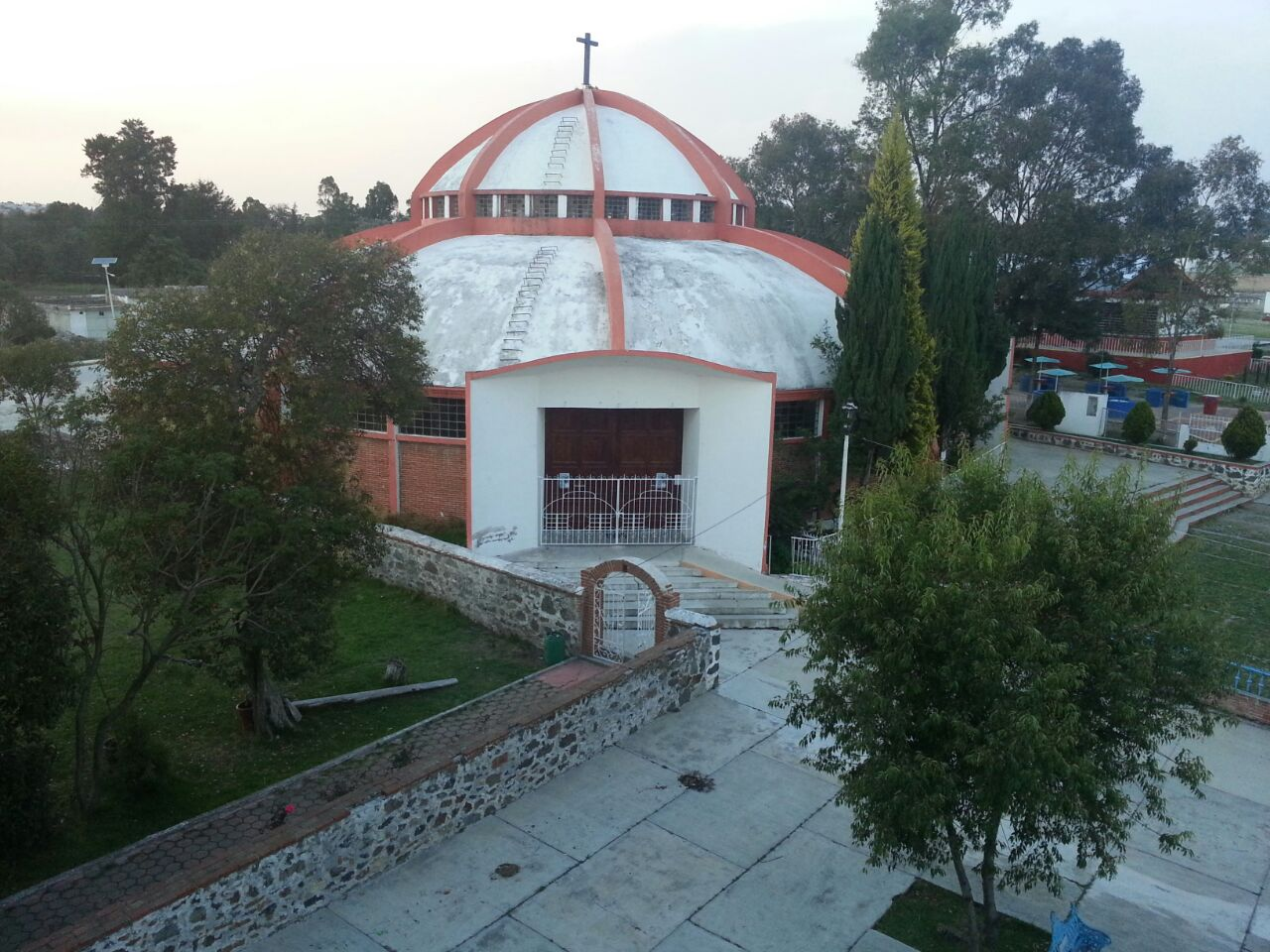 Santa Anita Huiloac